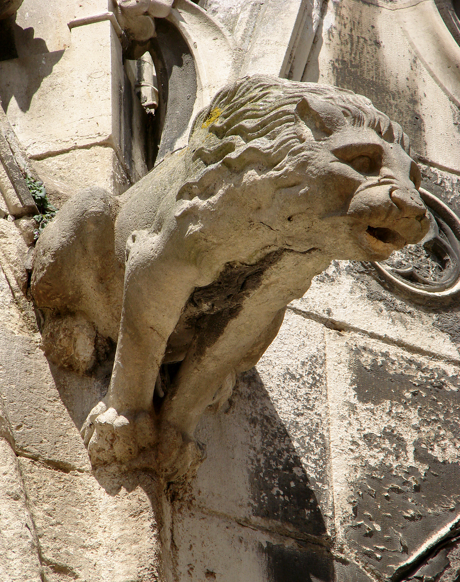 Gargouille en forme de lion à droite du portail du transept Sud. Cathédrale Saint-Etienne de Meaux.